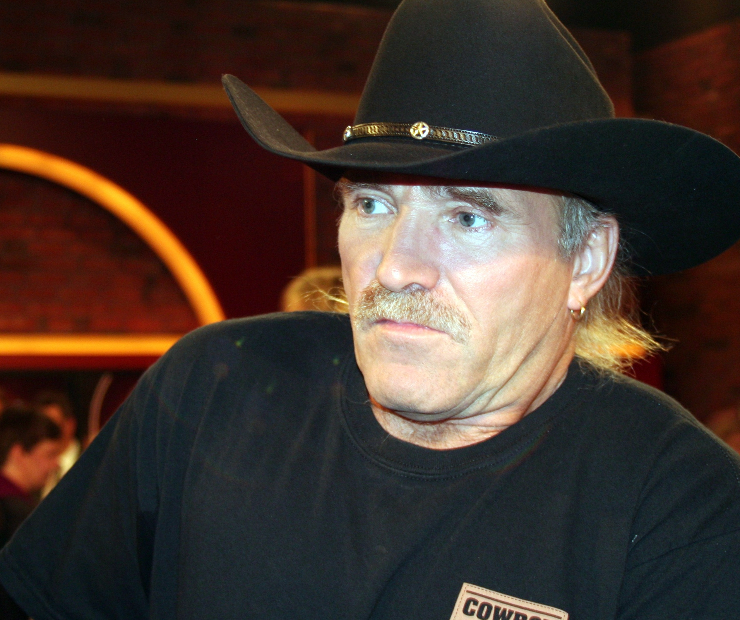 Konny Reimann König der Auswanderer